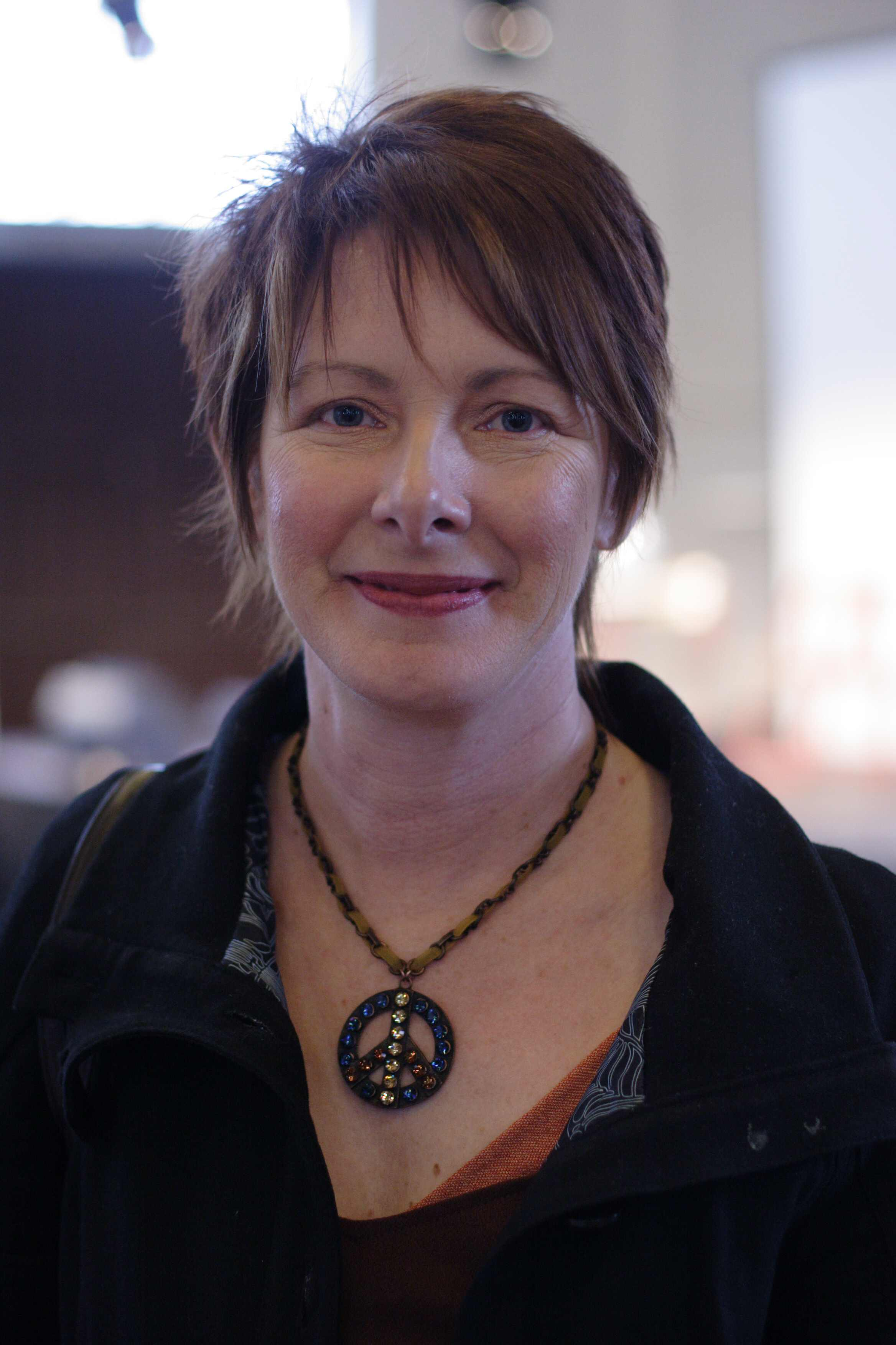 Sherry Jones, 15. marts 2009 i Ridehuset i Århus